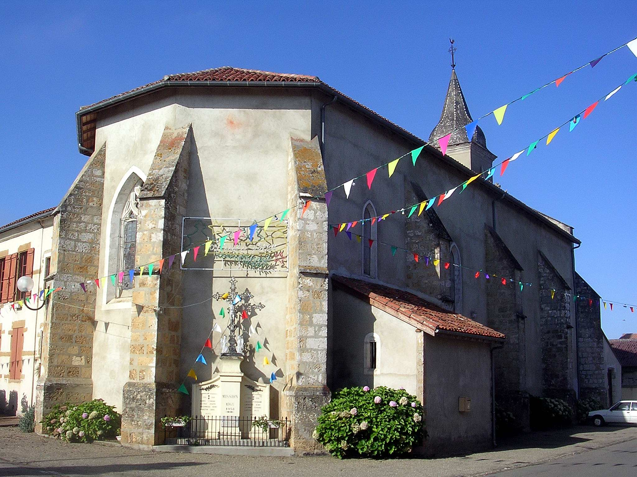 Église Saint-Maurice, sur la commune de Saint-Maurice sur-Adour, dans le département français des Landes